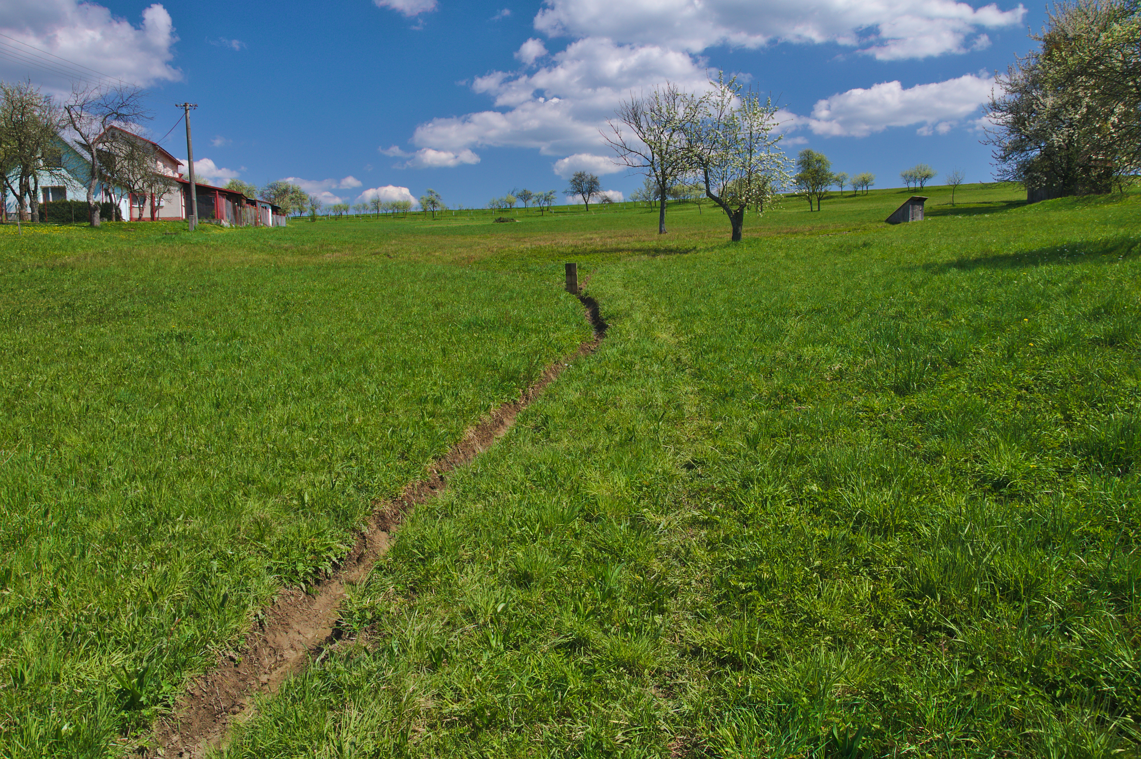 Přírodní památka Sucháčkovy paseky, okres Vsetín